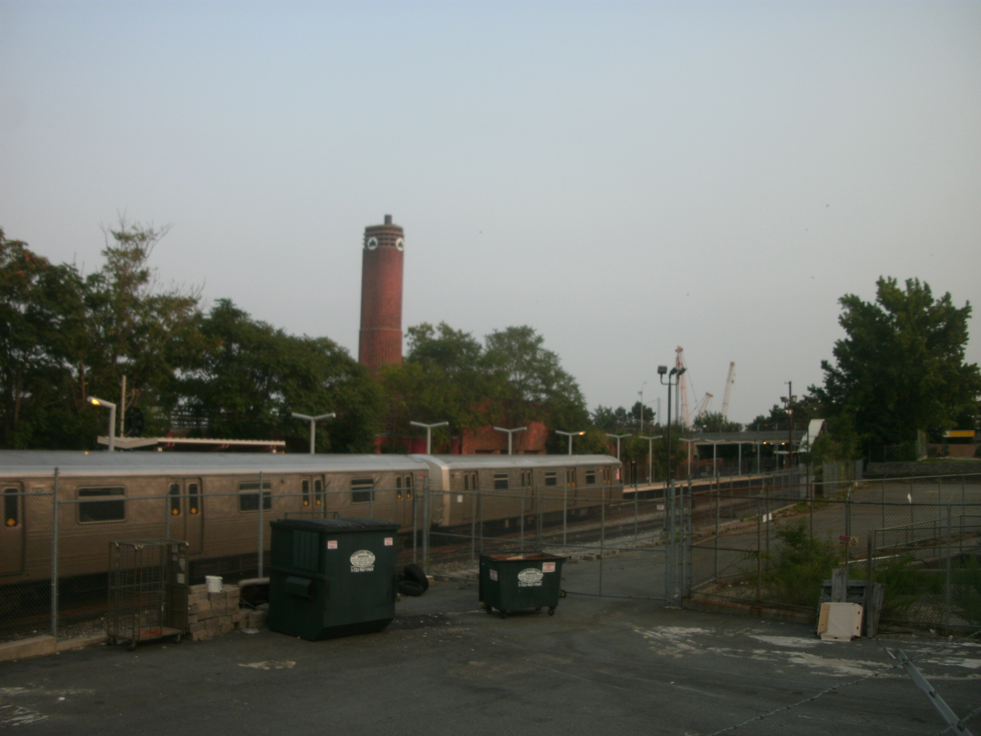 Ge digital camera